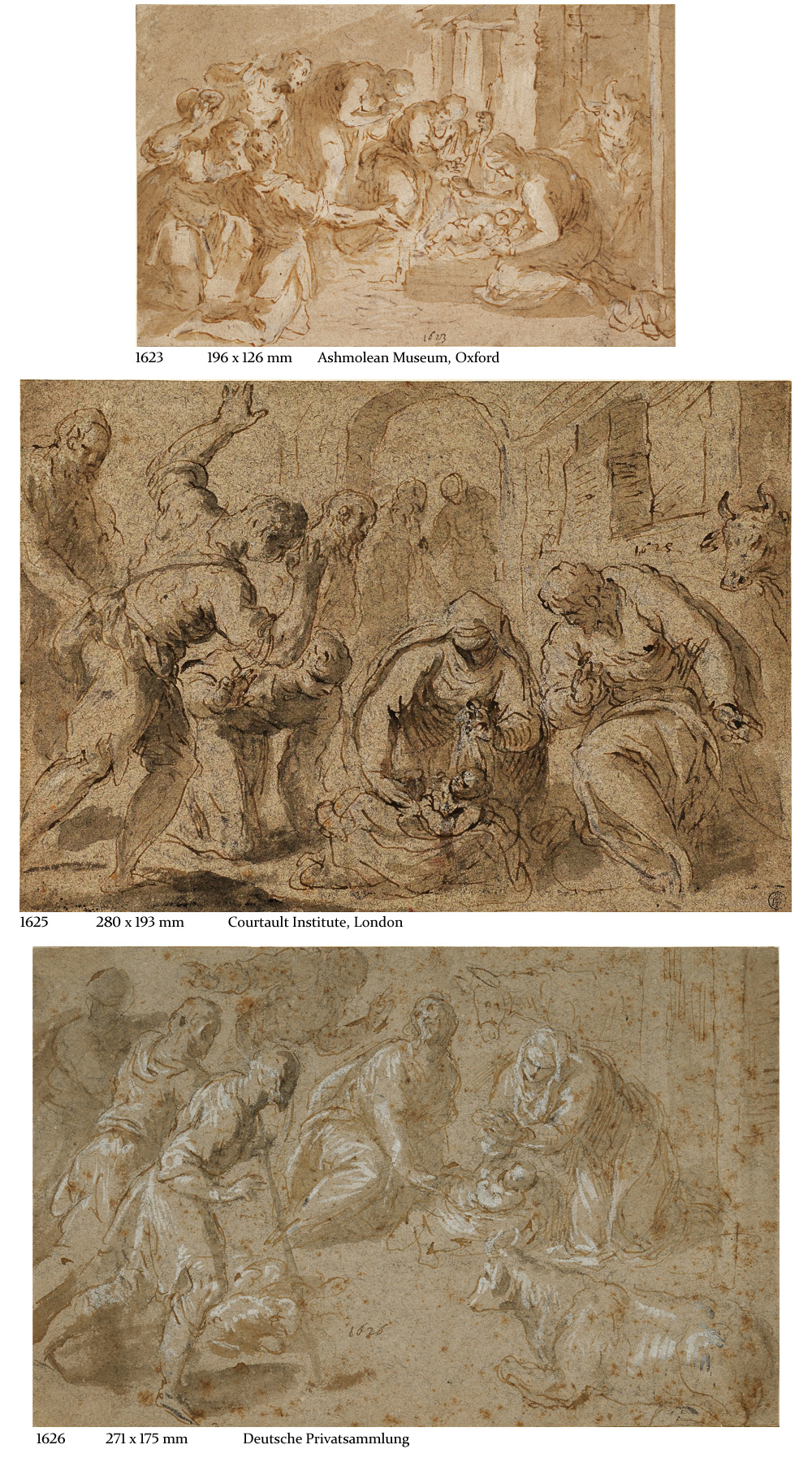 Drei gezeichnete Fassung der Anbetung der Hirten von Palma Giovane, datiert 1623, 1625 und 1626